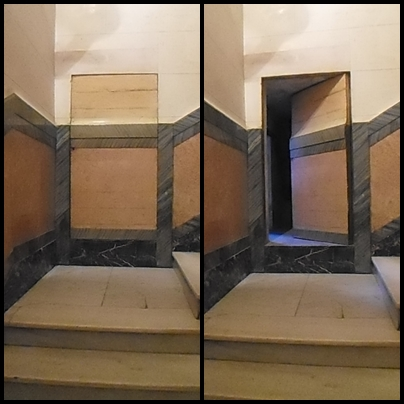 Esta entrada en la pared sirvió de enlace con un escondite republicano donde se refugiaban los pertenecientes al hospital (hoy Palacio de los Condes de Ayala) en Castuera, durante la Guerra Civil.